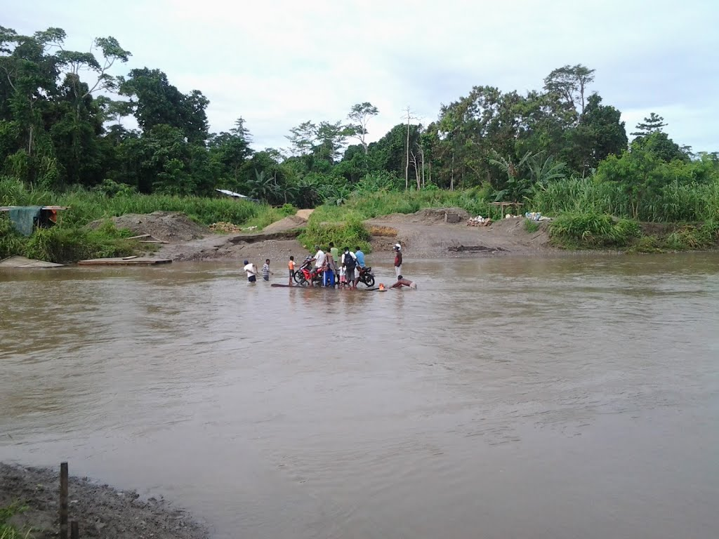 Salah satu sungai yang terdapat di kabupaten Tambrauw